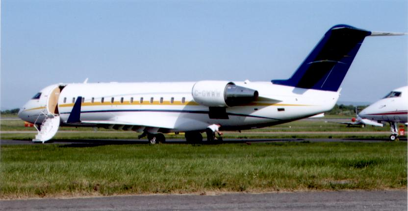 Bombardier Challenger 850 C-GWWW at Manchester